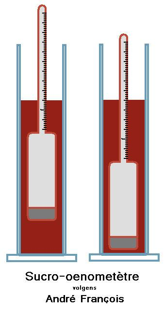 Suikermeter volgens het patent van André Francois 1837 Sucro-oenomètre